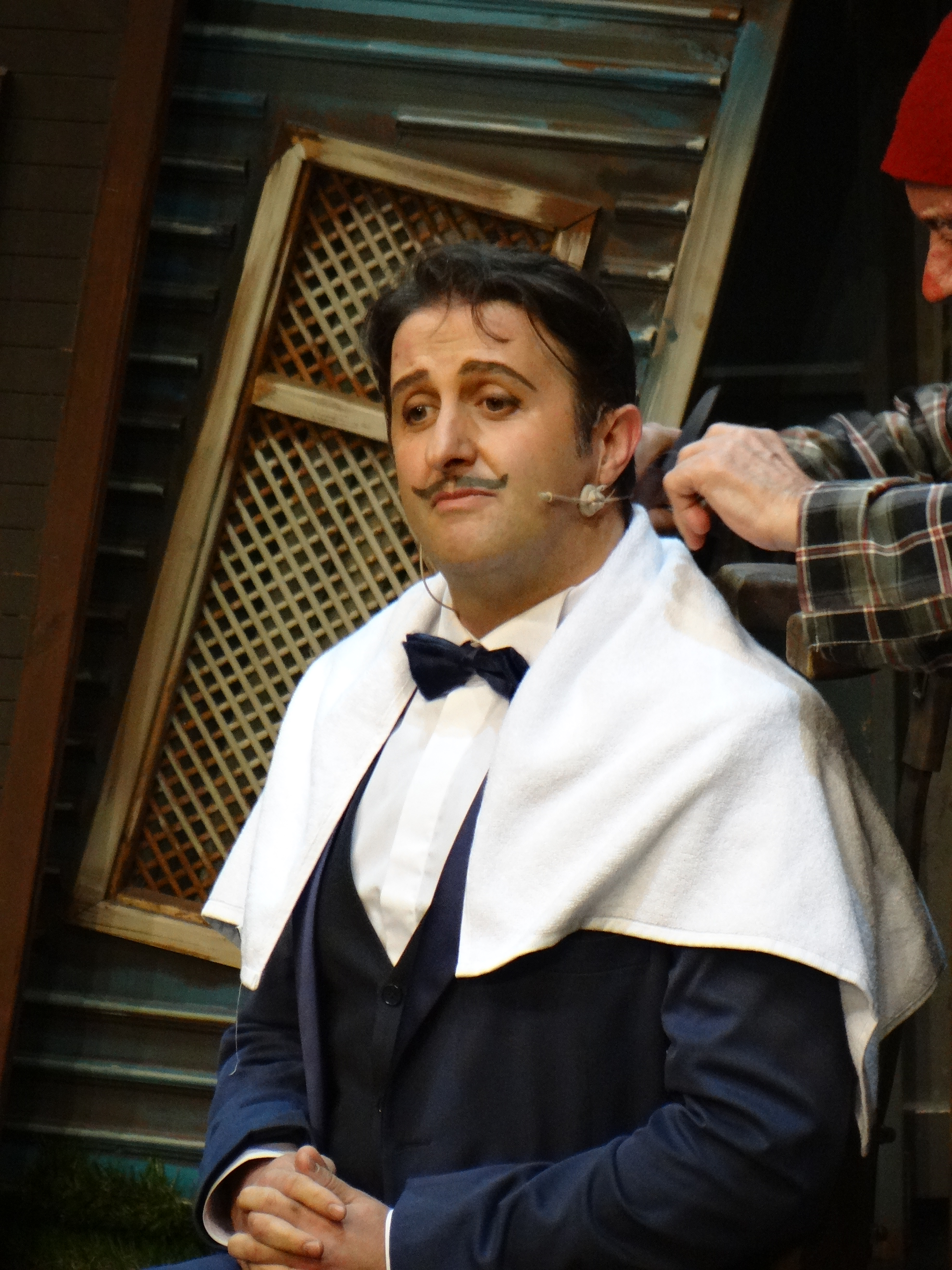 İlker Ayrık at 7 Kocalı Hürmüz